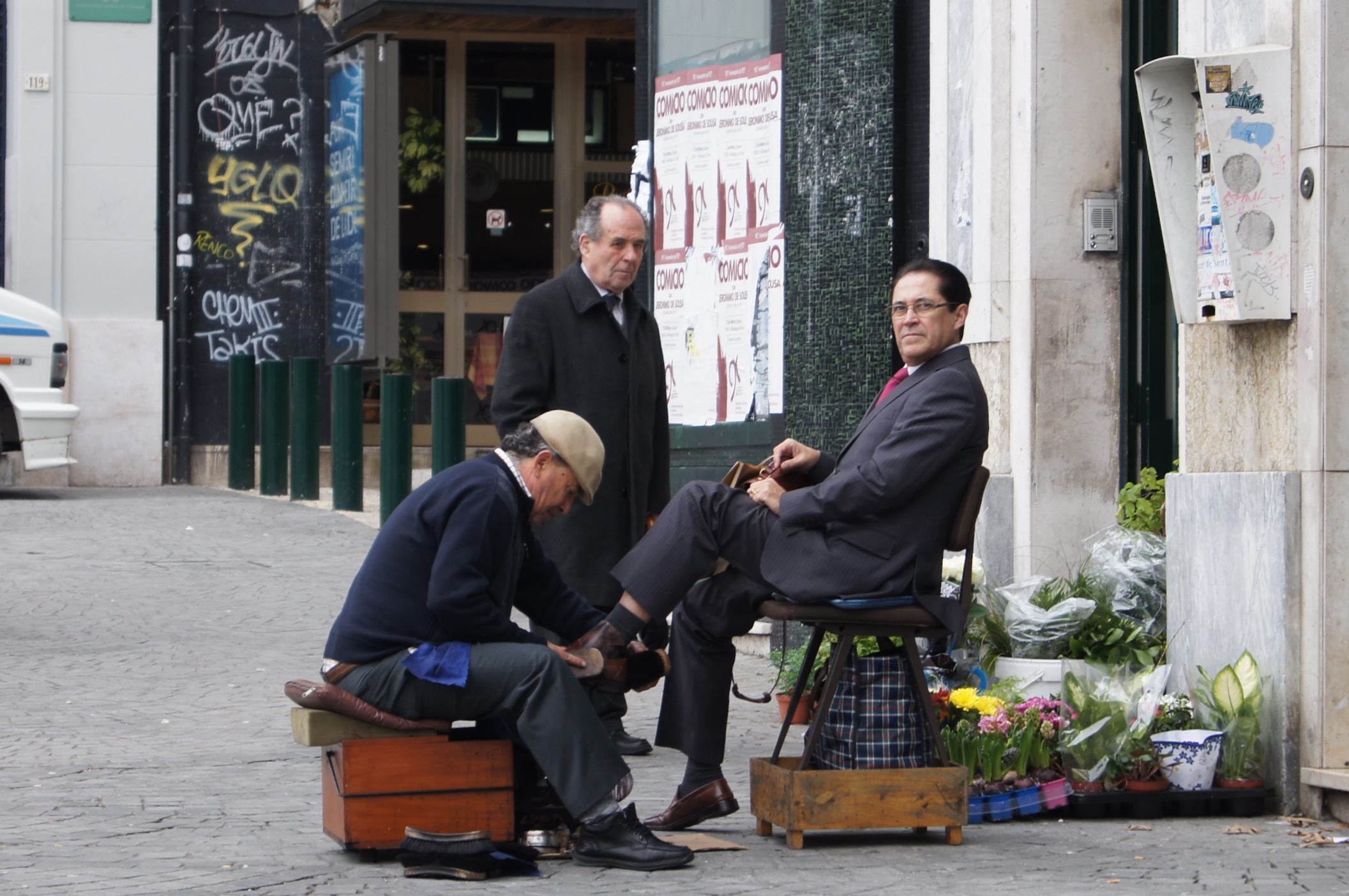 Praça da Liberadade, Porto